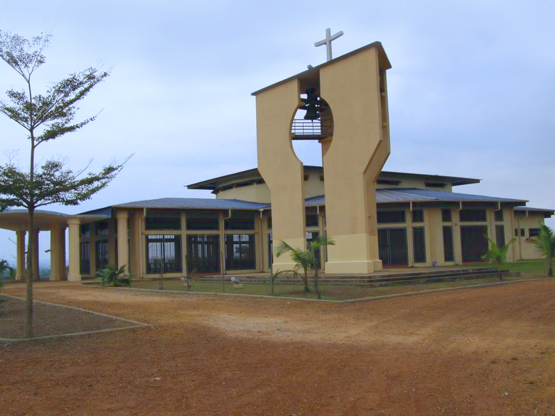 Photo de la cathédrale Saint-Jean l'apôtre à Mouila, au Gabon. 2010